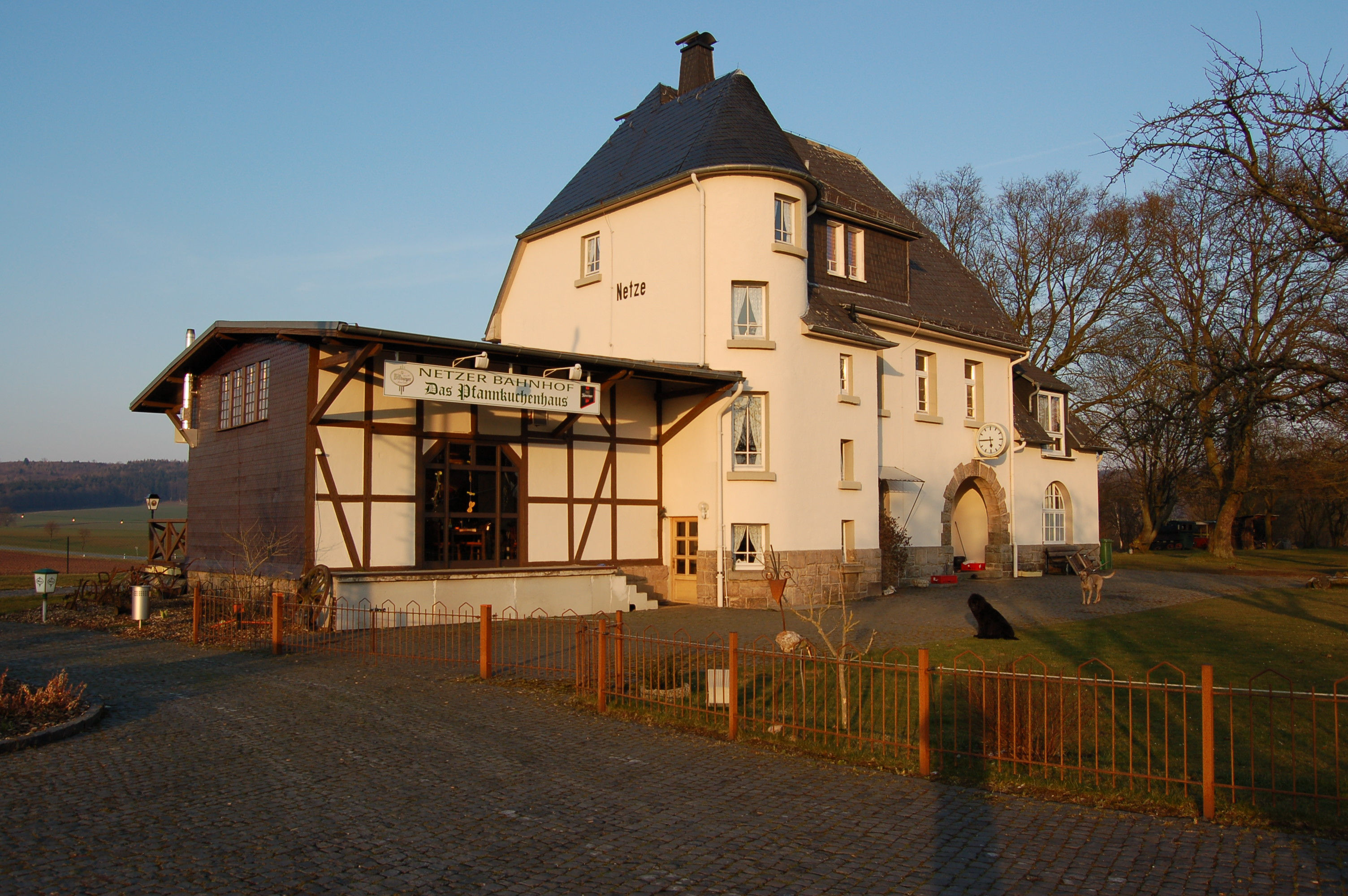 Bahnhof Netze an der stillgelegten Ederseebahn